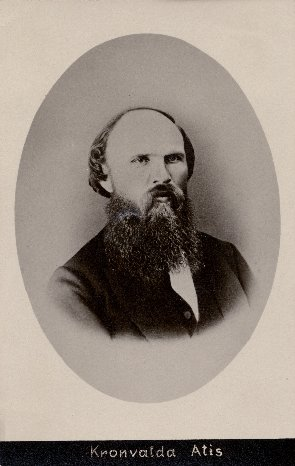 Photo de l'écrivain letton Atis Kronvalds fait en 1870 par un inconnu. Portrait 13,5 x 8,5 cm.